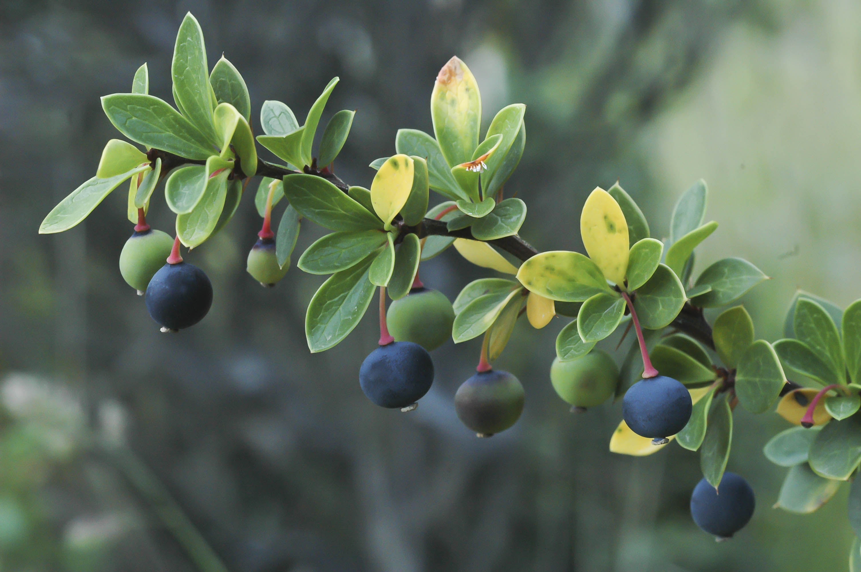 Fruto do calafate, mata típica da Patagônia Chilena e Argentina.